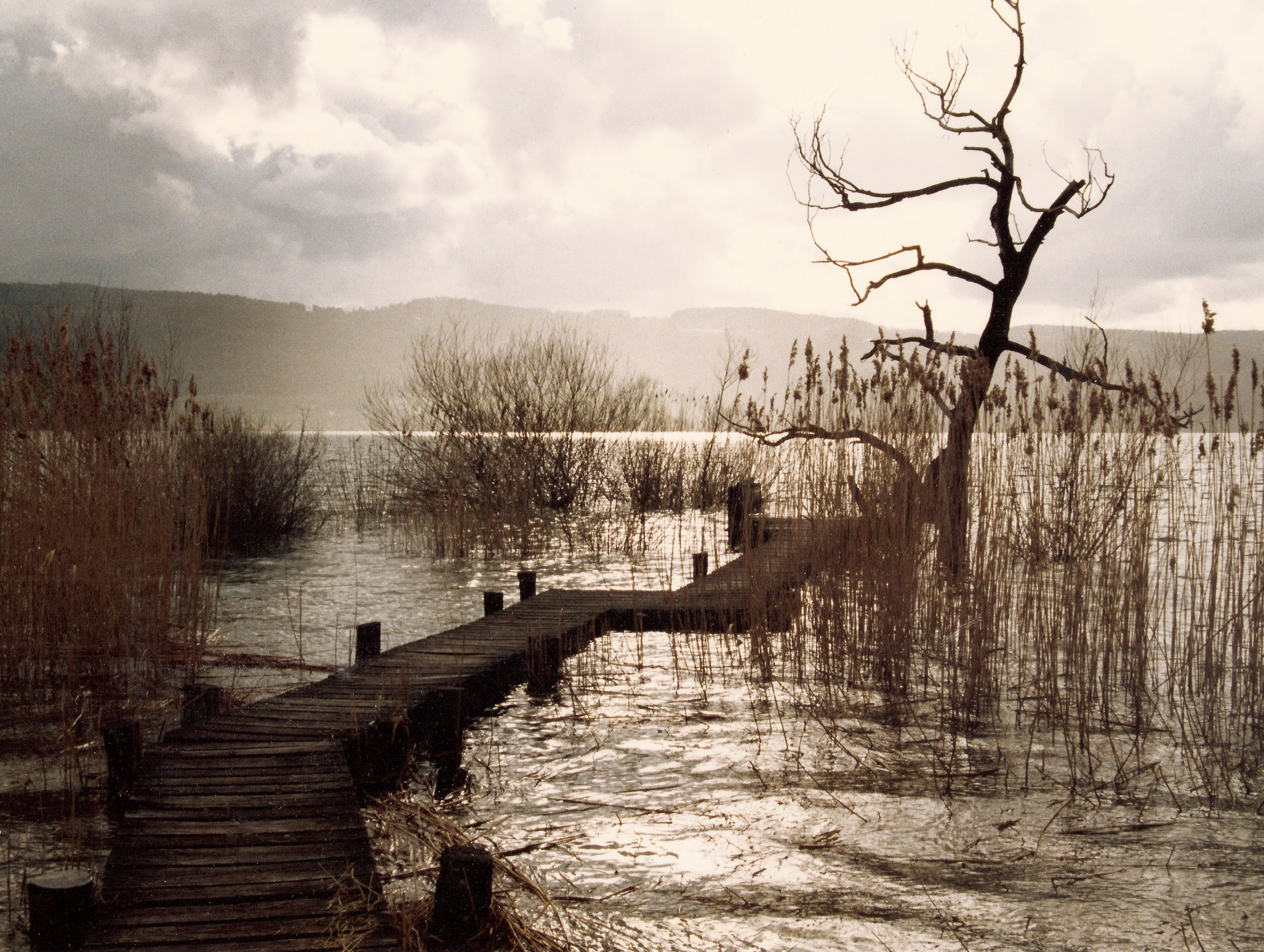 Greifensee between Greifensee (ZH) and Niederuster seen to the southwest